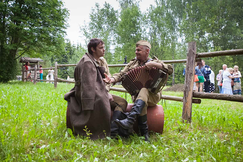 Самодеятельный театр Плосковского дома культуры